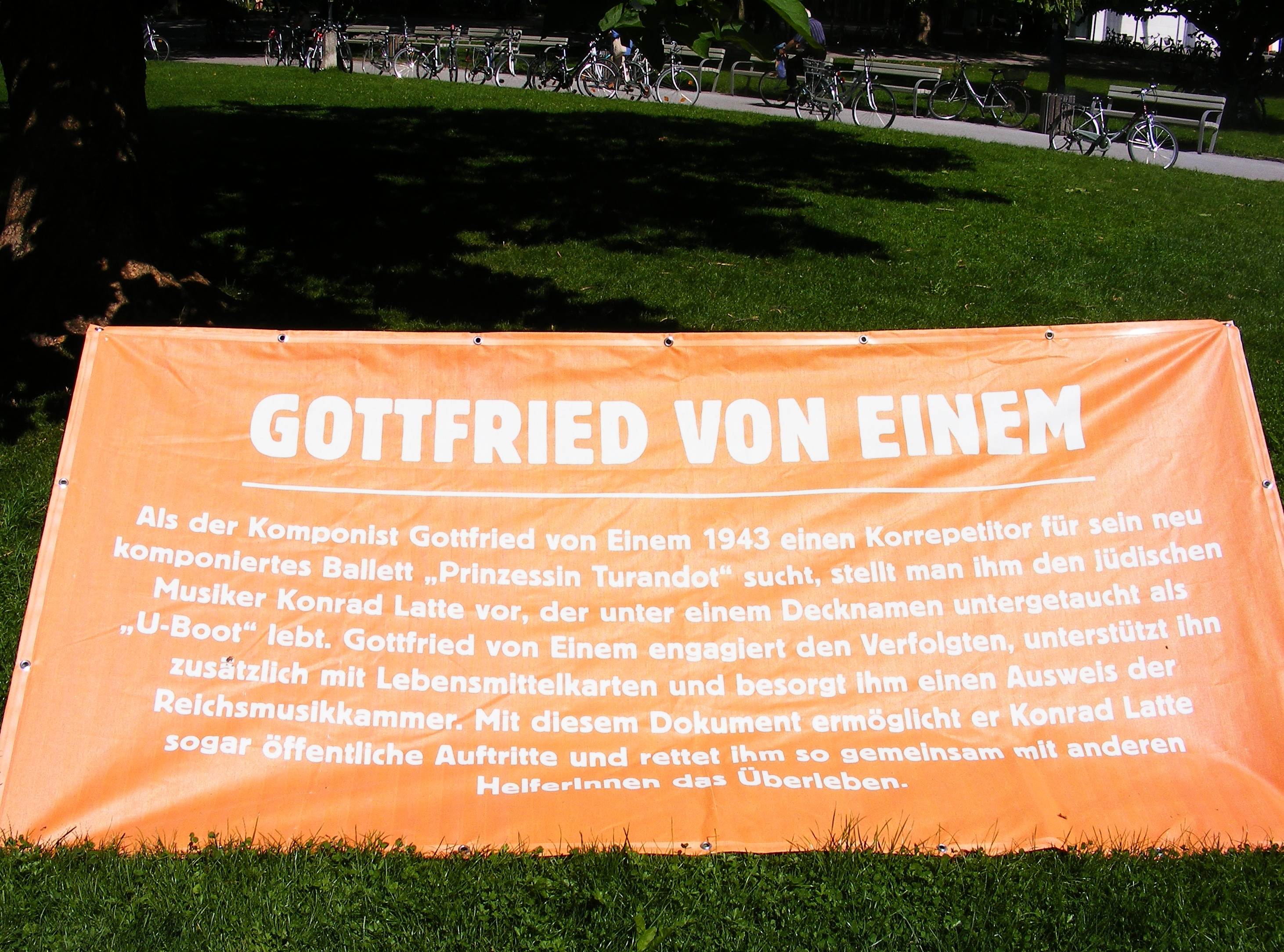 TransparentAktion "Allee der Gerechten", Salzburg 2012, Gottfried von Einem